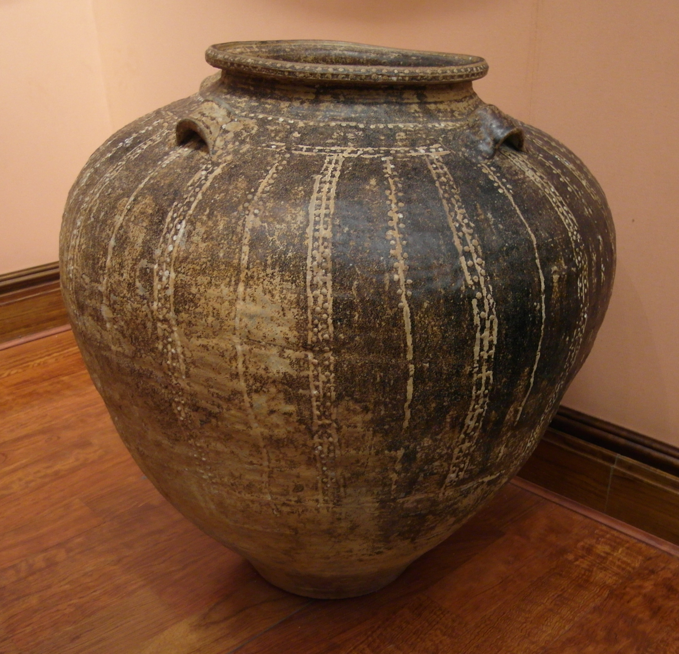 Tinaja de gres ferruginoso de la nao San Diego, fabricada en los talleres birmanos de Pegún entre 1566 y 1600.